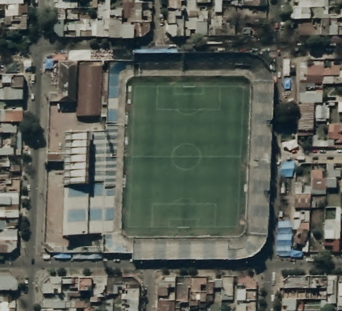 Vista aérea del estadio José Fierro de Atlético Tucuman